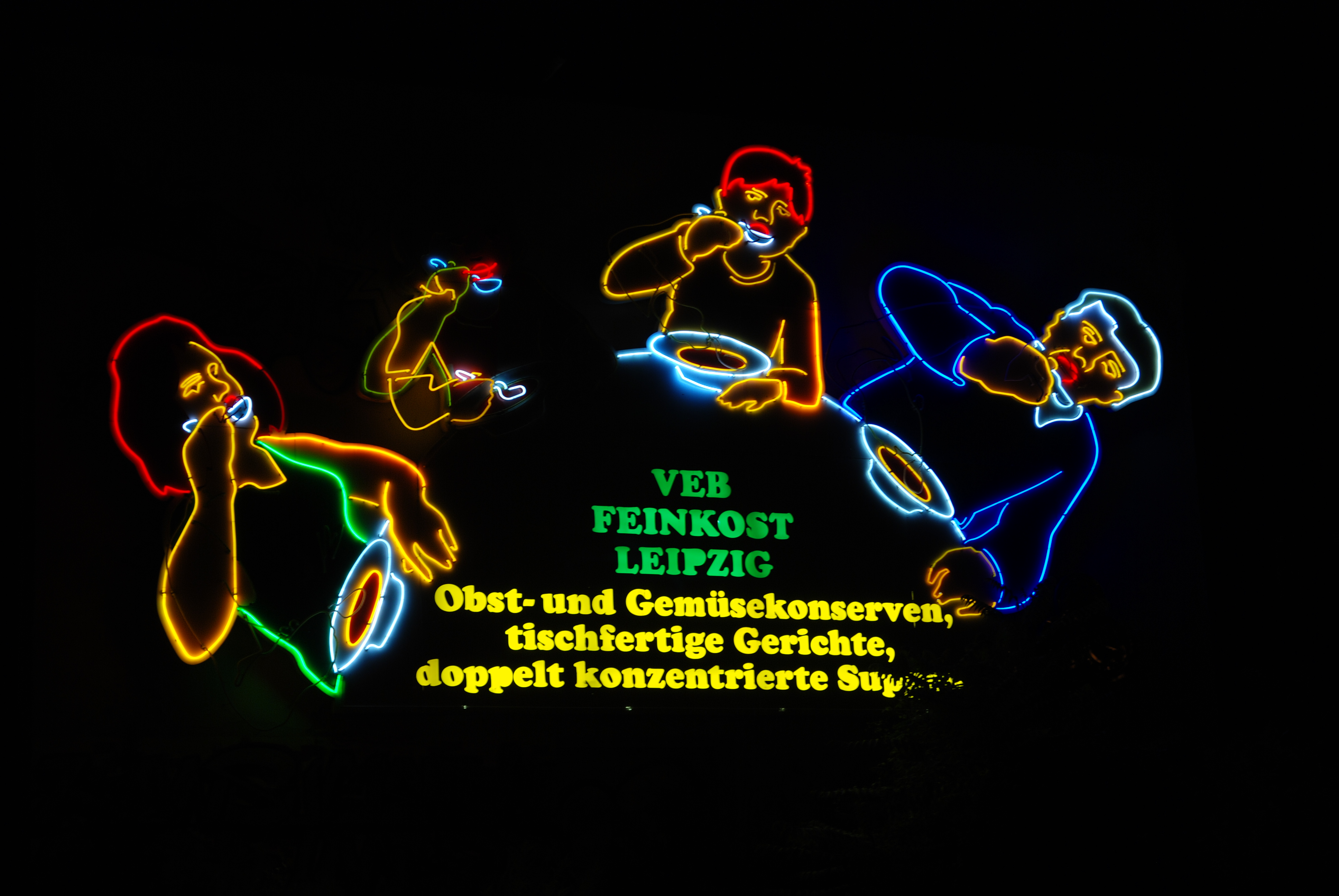 Leuchtreklame an der Feinkost, Leipzig, leider ist eine Figur kaputt